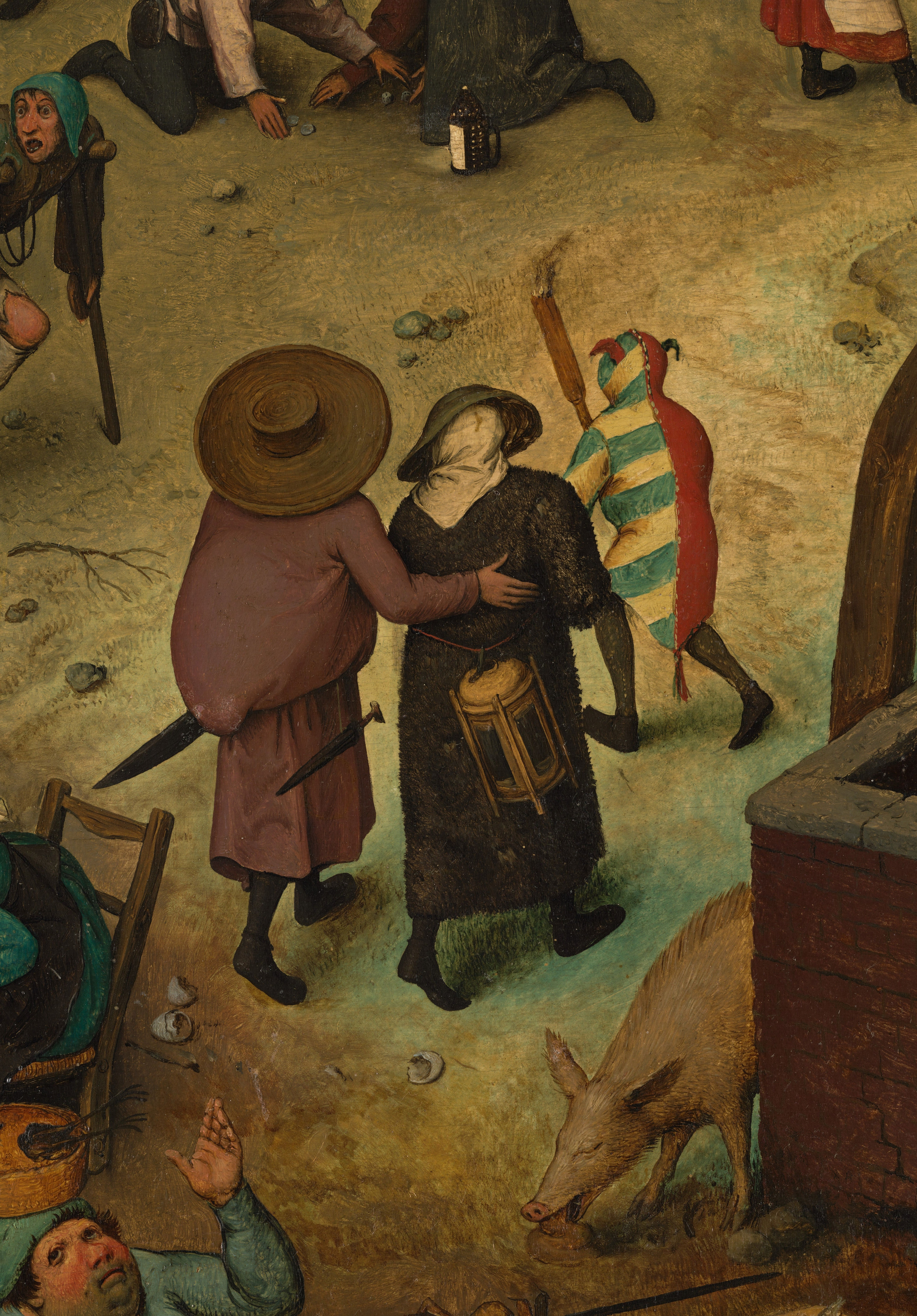 Detail van De Strijd tussen Vasten en Vastenavond: het "notabele paar" en de nar met mi-parti kostuum.